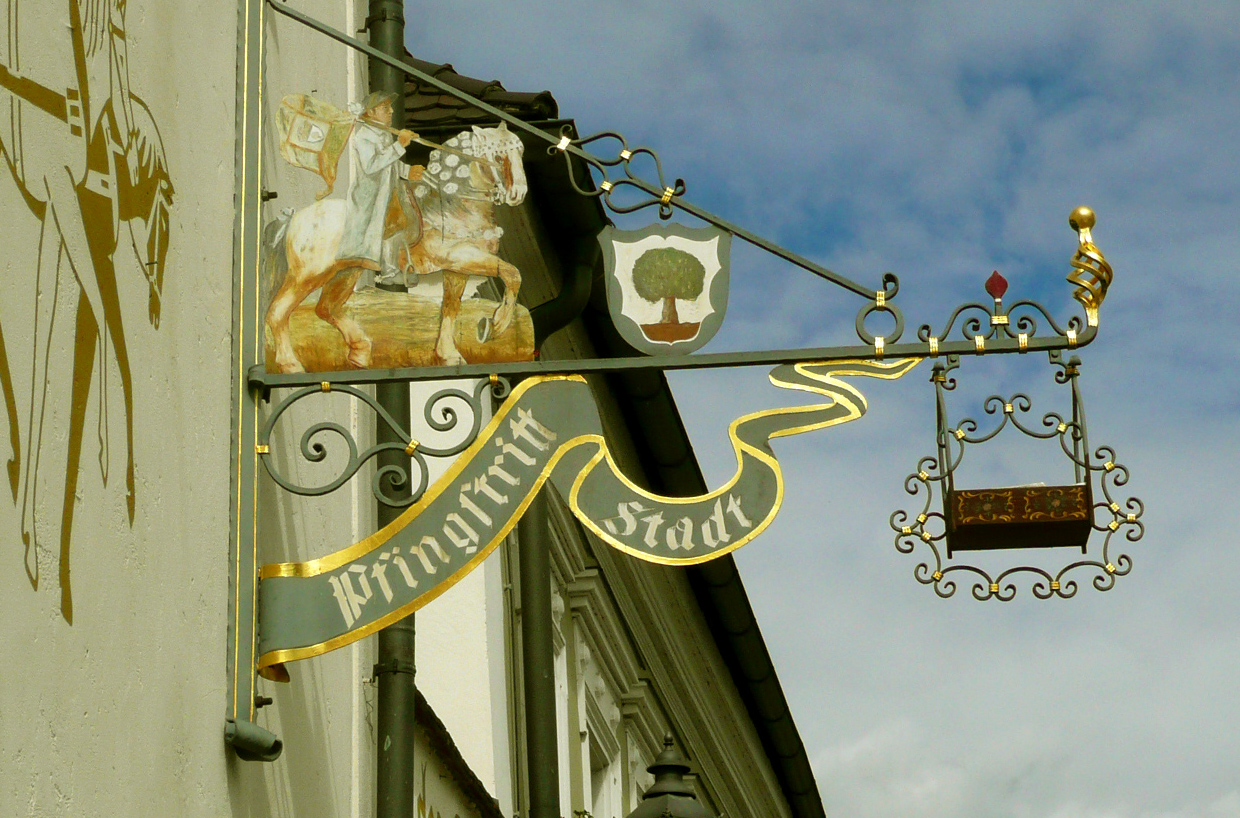 Enseigne évoquant le pèlerinage de Pentecôte à Bad Kötzting